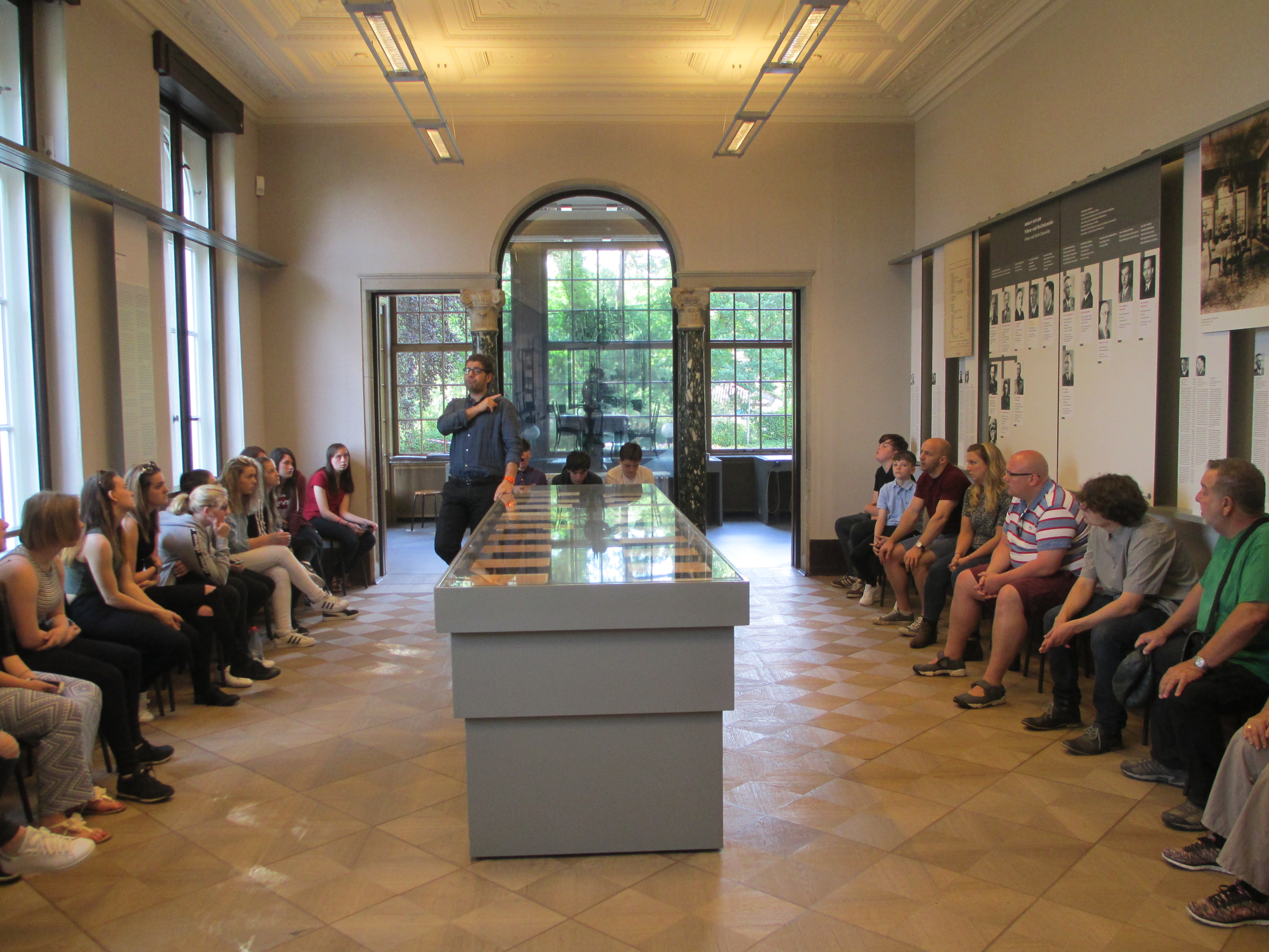 קבוצת תיירים באולם הוועידה בווילה ואנזה